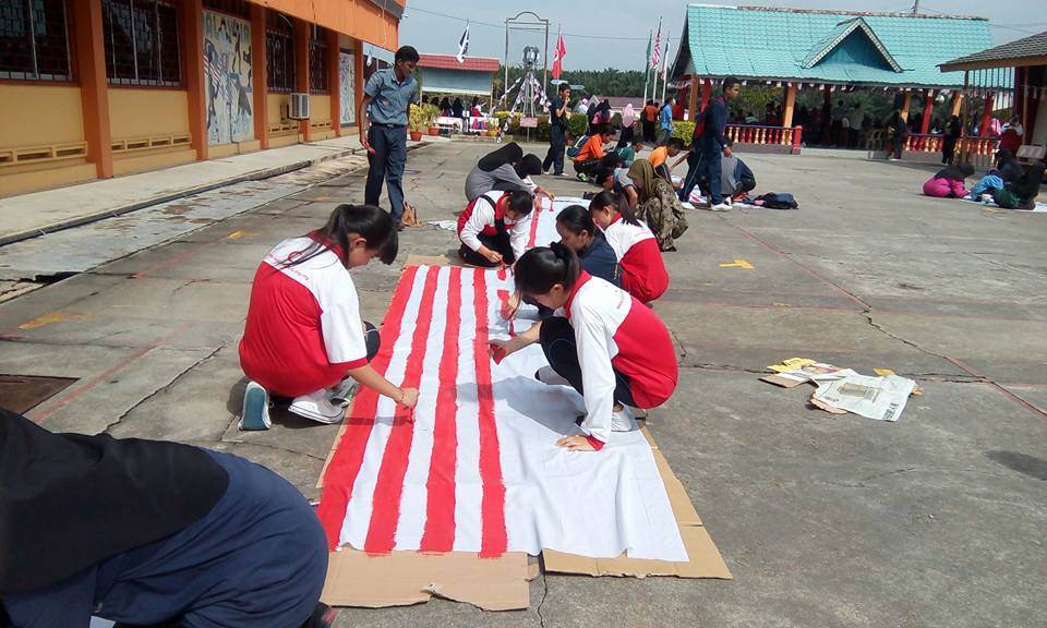 Mewarna Jalur Gemilang 2